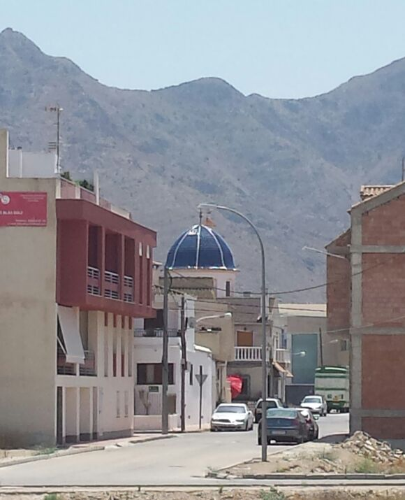 Granja de Rocamora, Baix Segura